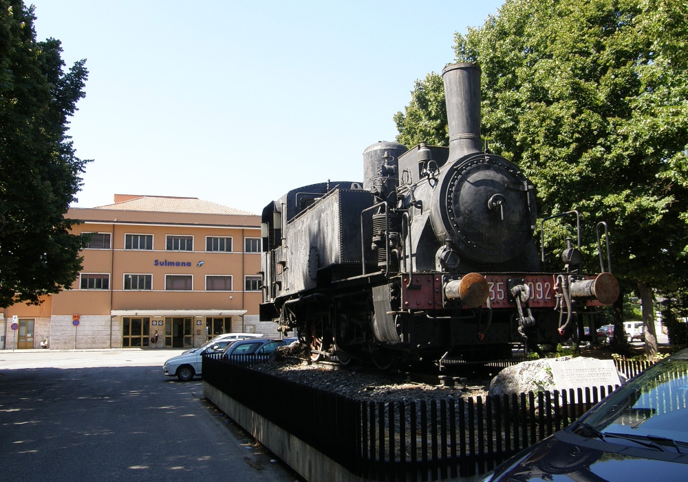 Sulmona